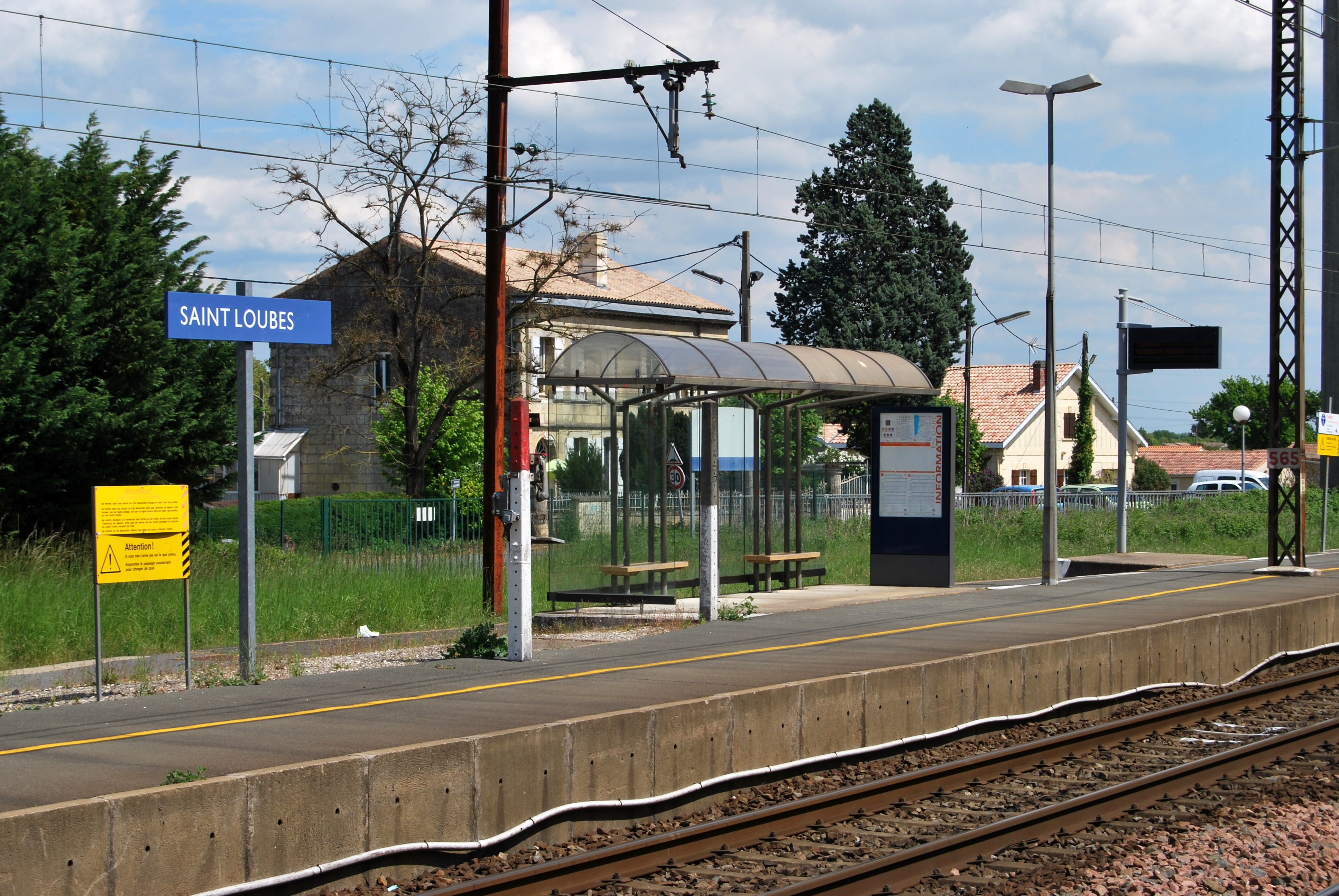 Gare de Saint-Loubès